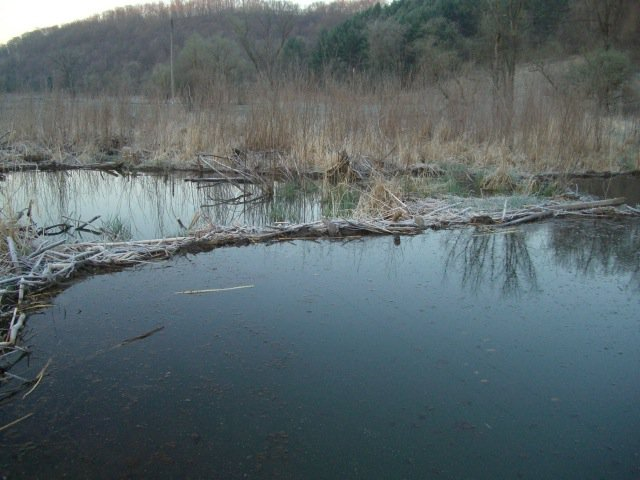 Beaver Dam on Weister Creek, Wisconsin